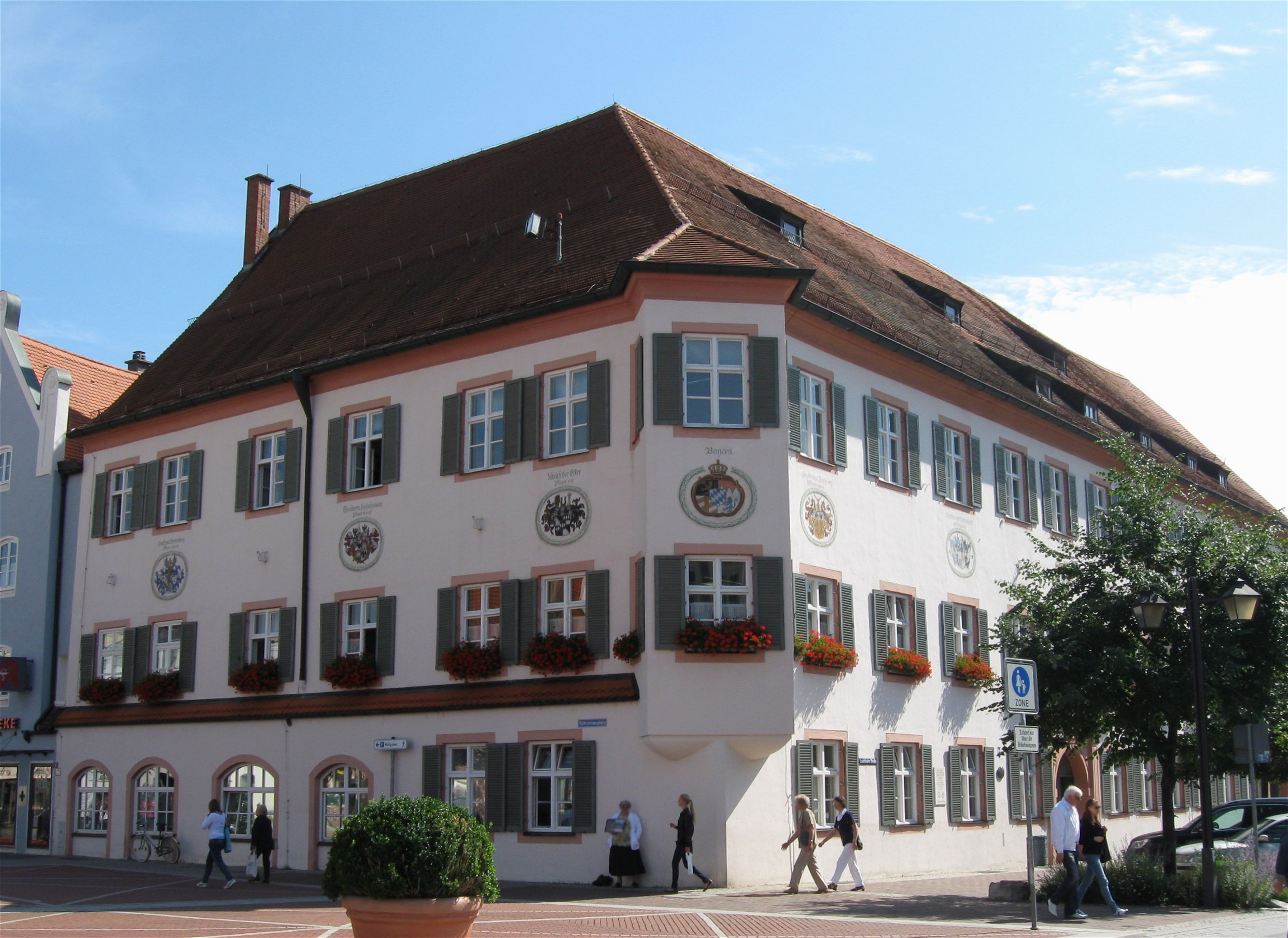 Landshuter Straße 1. Rathaus, ehem. Stadtresidenz der Grafen von Preysing (sog. „Grafenstock“), 17. Jh.